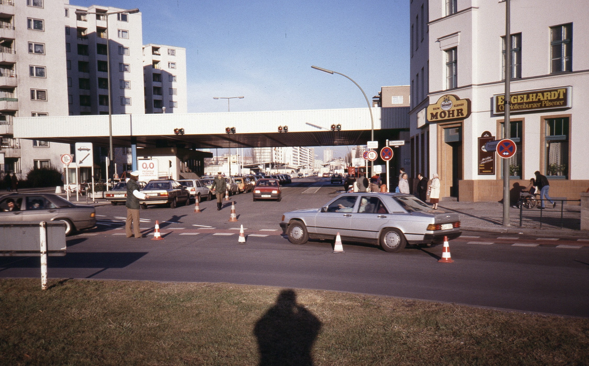 Moritzplatz Berlin mit Grenzübergang Prinzenstraße (West) / Heinrich-Heine-Straße (Ost). Der Fotograf befindet sich in West-Berlin. Das überdachte Grenzabfertigungsgelände befindet sich im Ost-Berliner Bezirk Mitte.